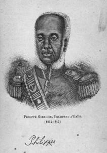 Portrait du président d'Haïti Philippe Guerrier.